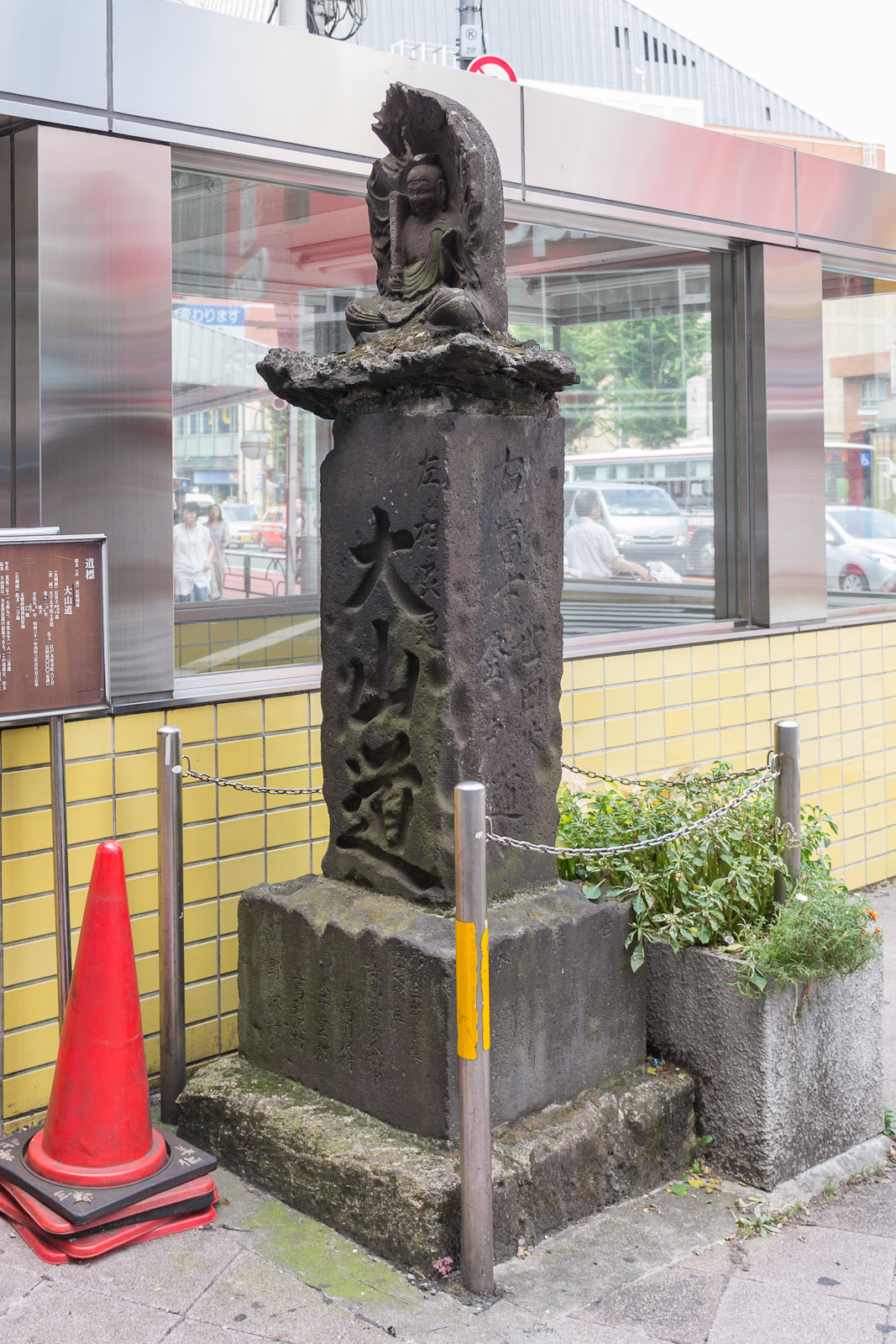 三軒茶屋の玉川通りと世田谷通り交差点にあるja:大山道の道標。